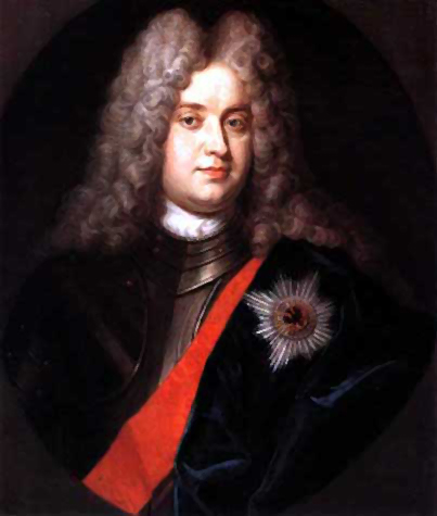 King Friedrich Wilhelm I of Prussia (1688-1740)